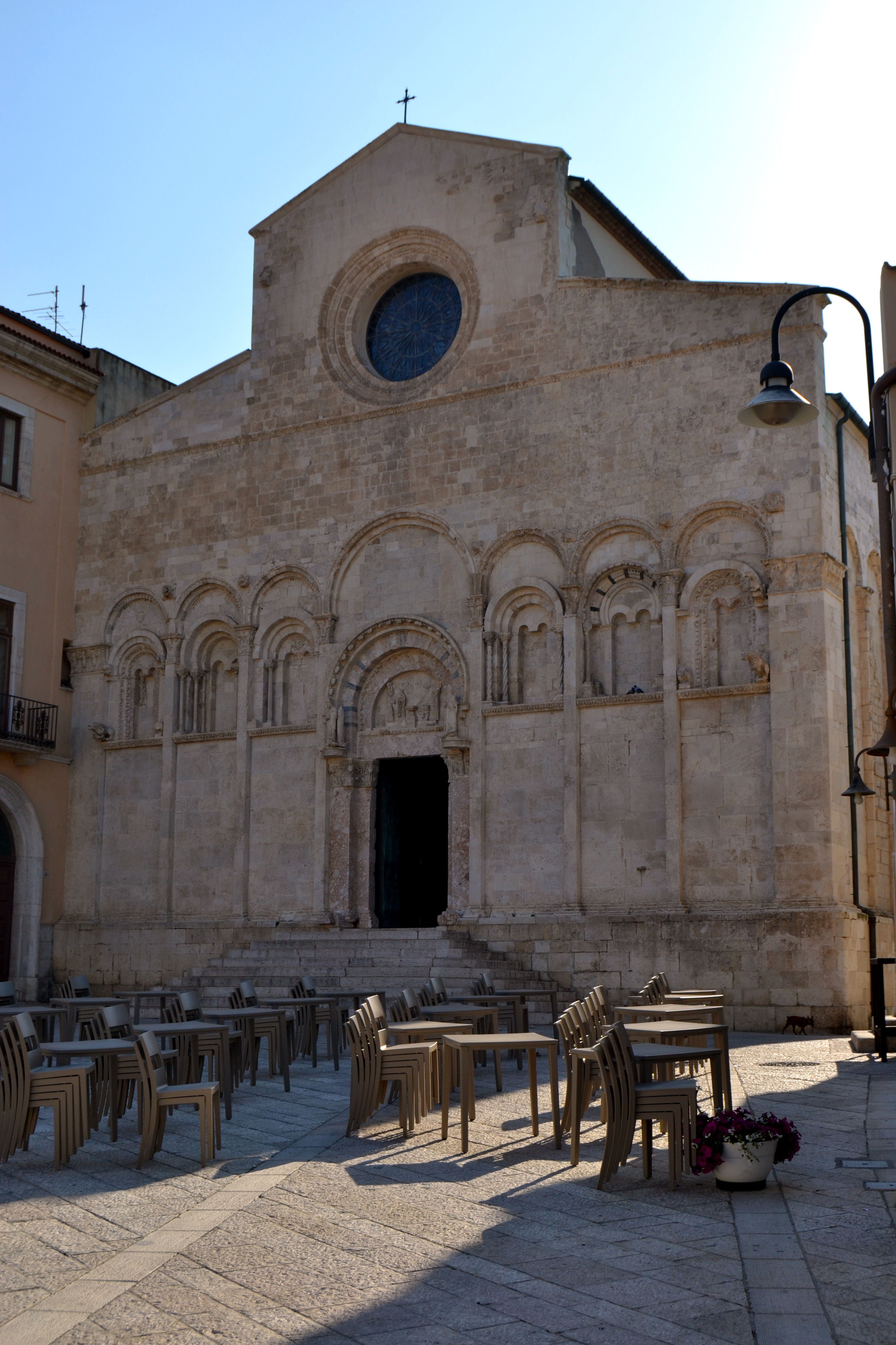 Duomo di Termoli